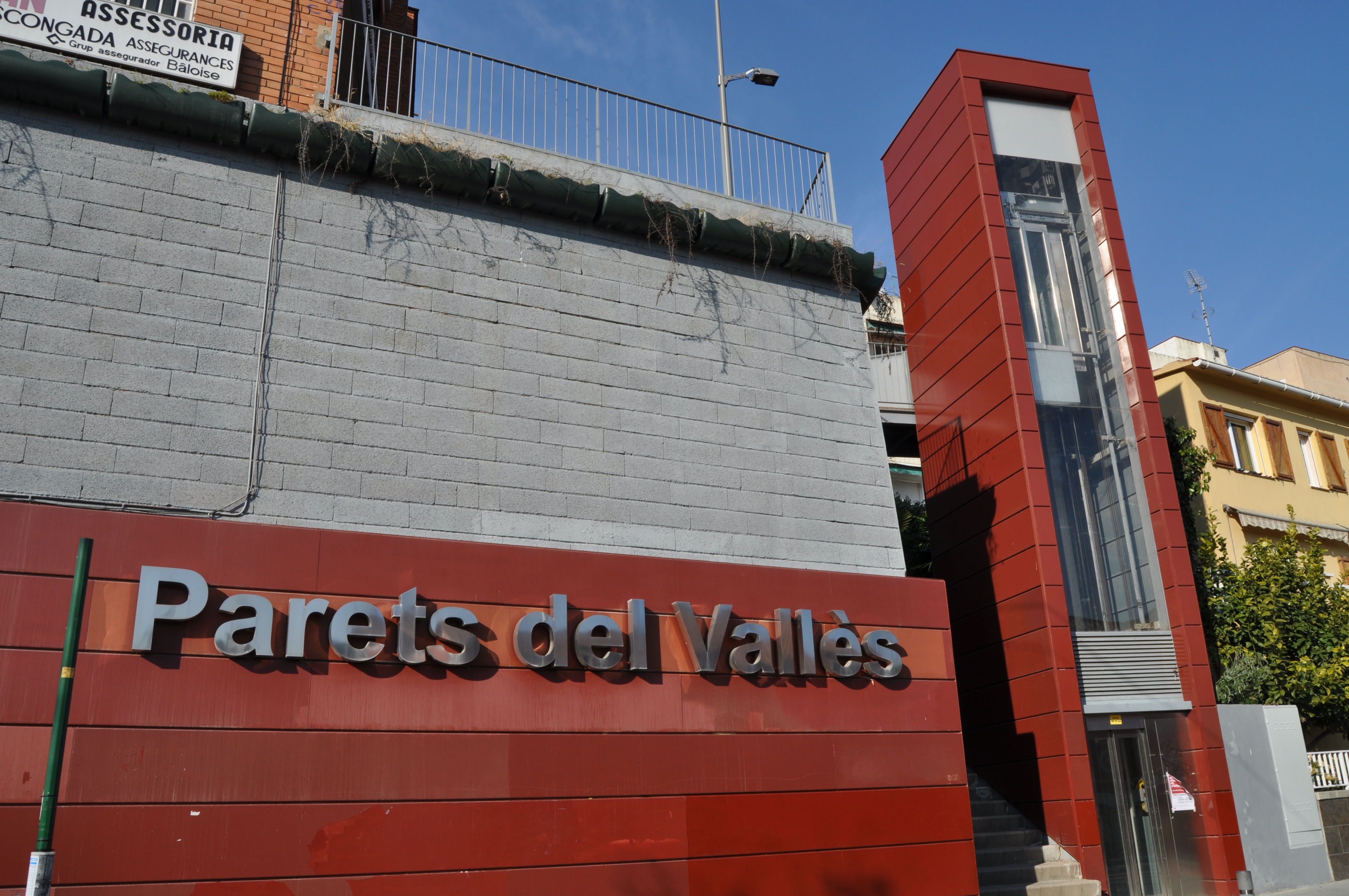 Parets del Vallès: Avinguda de l'Estació.